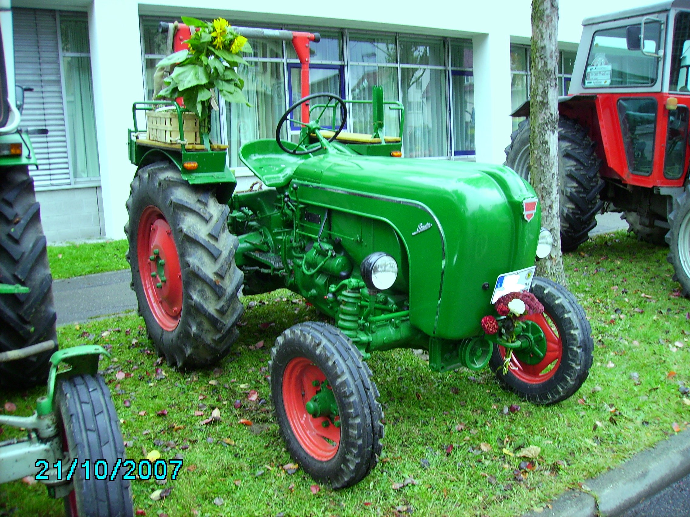 Allgaier A122